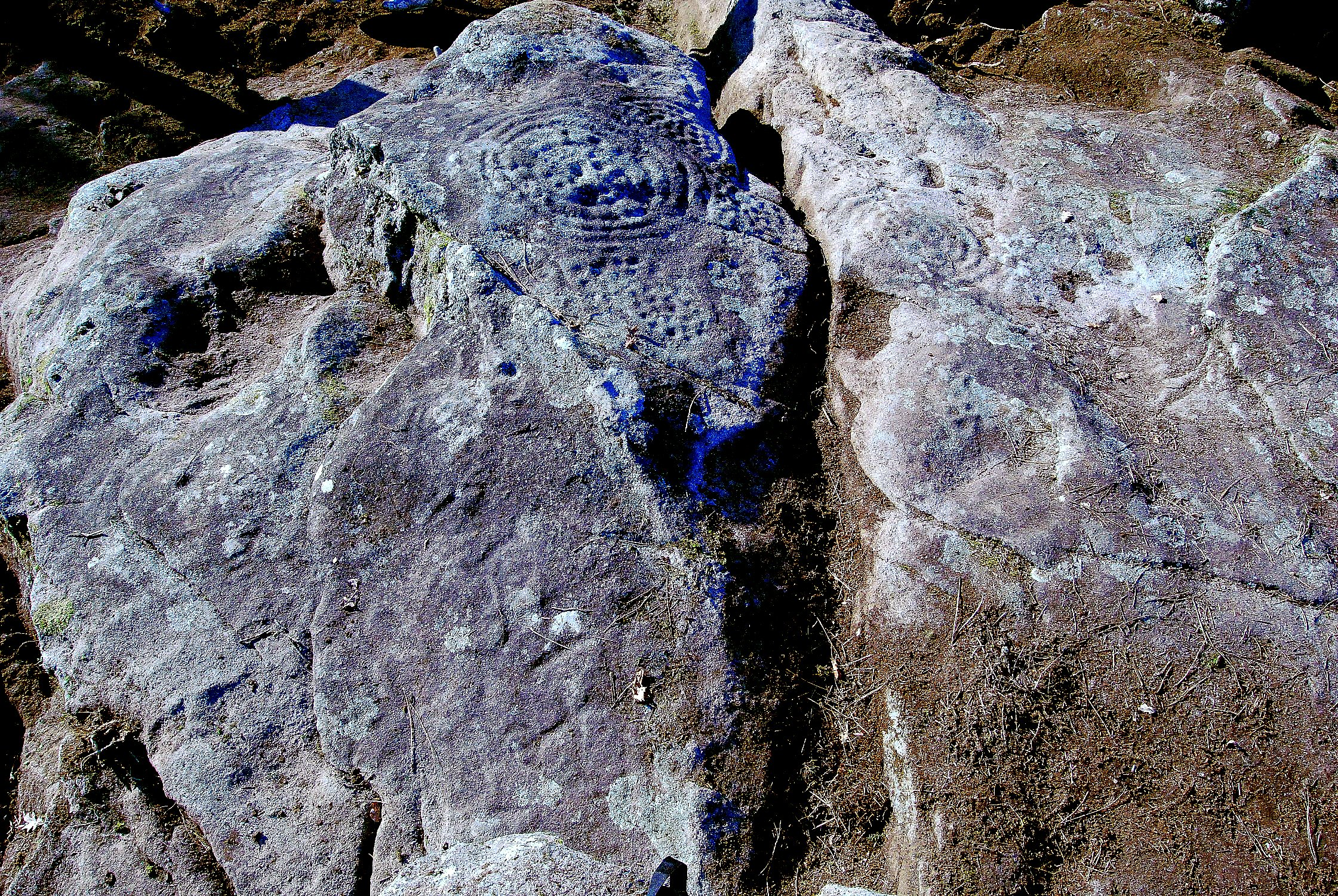 Círculos do petróglifo Bouza Abadín